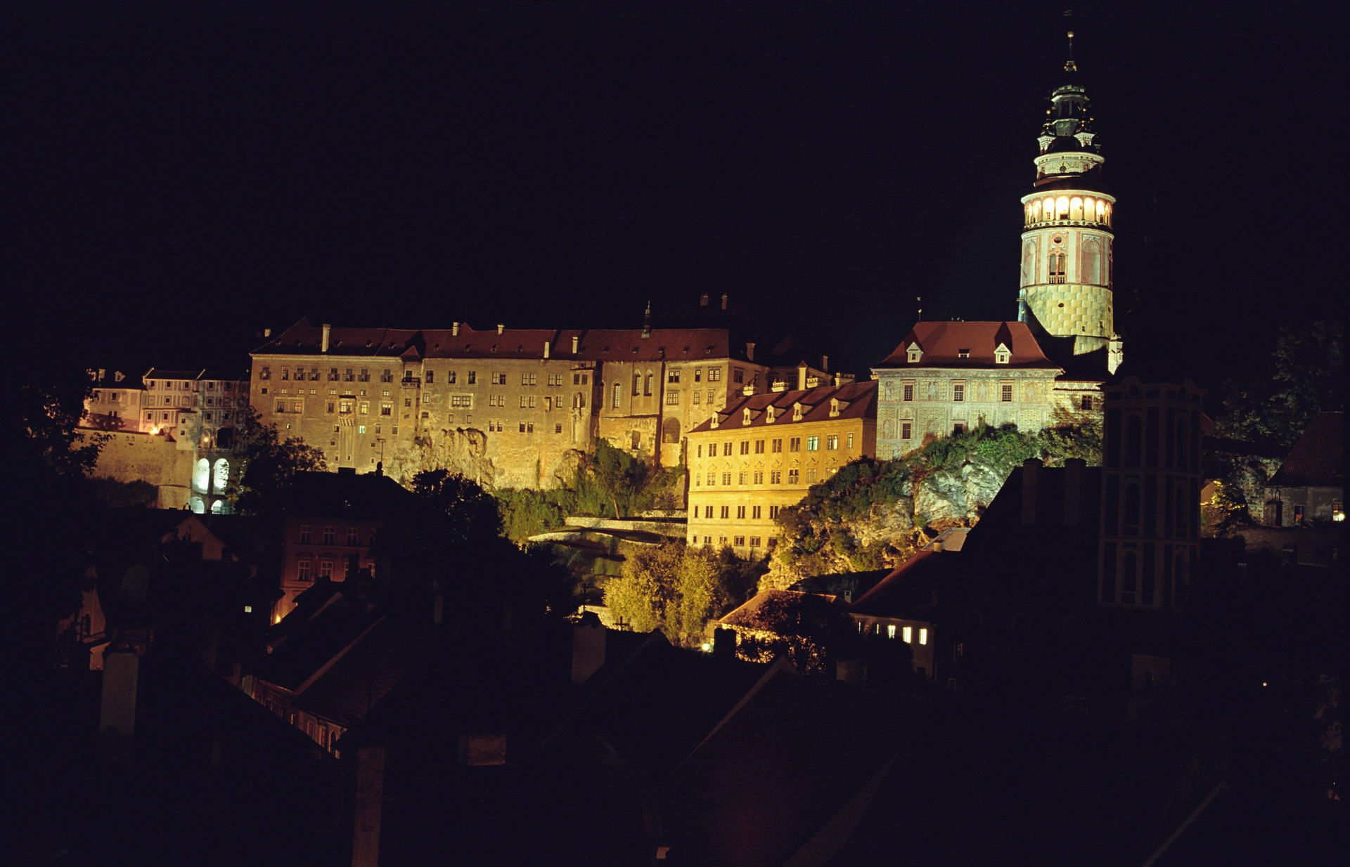 Český Krumlov